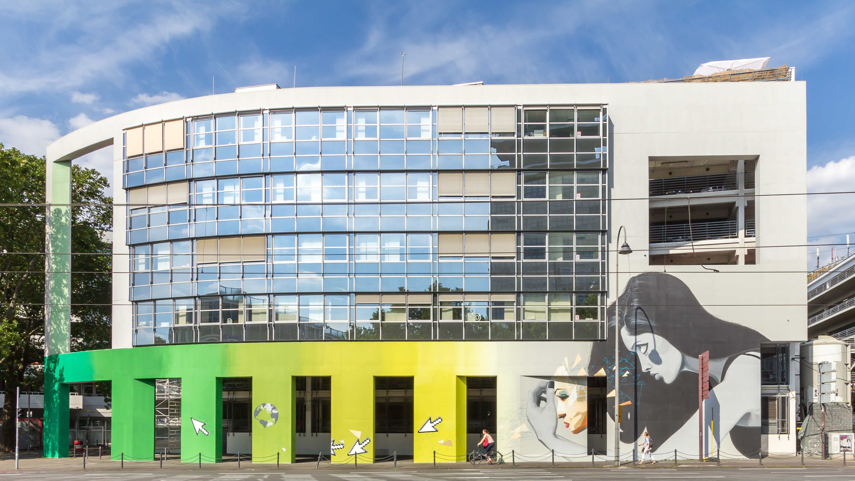 Wandgemälde am Parkhaus II (Kaufhof Köln) an der Cäcilienstraße/Ecke An Sankt Agatha. Architekten: Johannes Kister, Reinhard Scheithauer & Partmer, Rudolf Simmerer. Baujahr: 1991-92; Bauherr: Kaufhof Holding AG